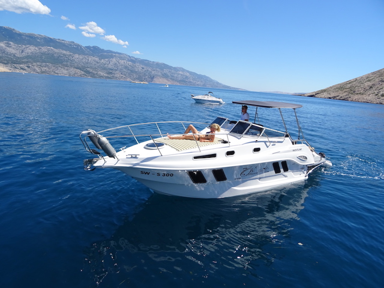 SR30 -Yachtline